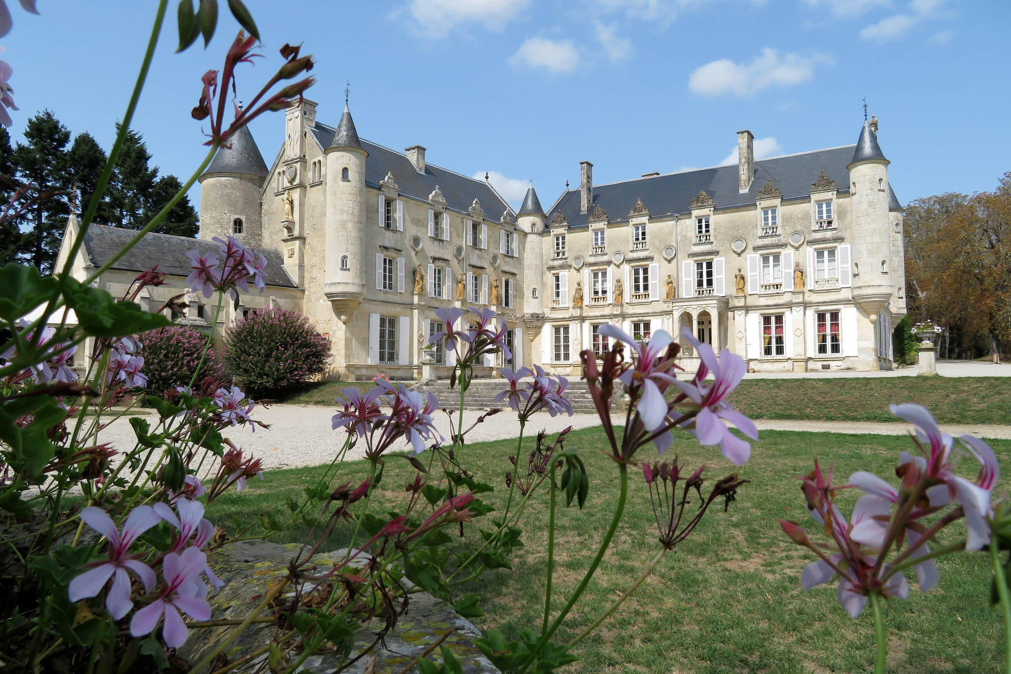 Vue du château depuis l'esplanade.